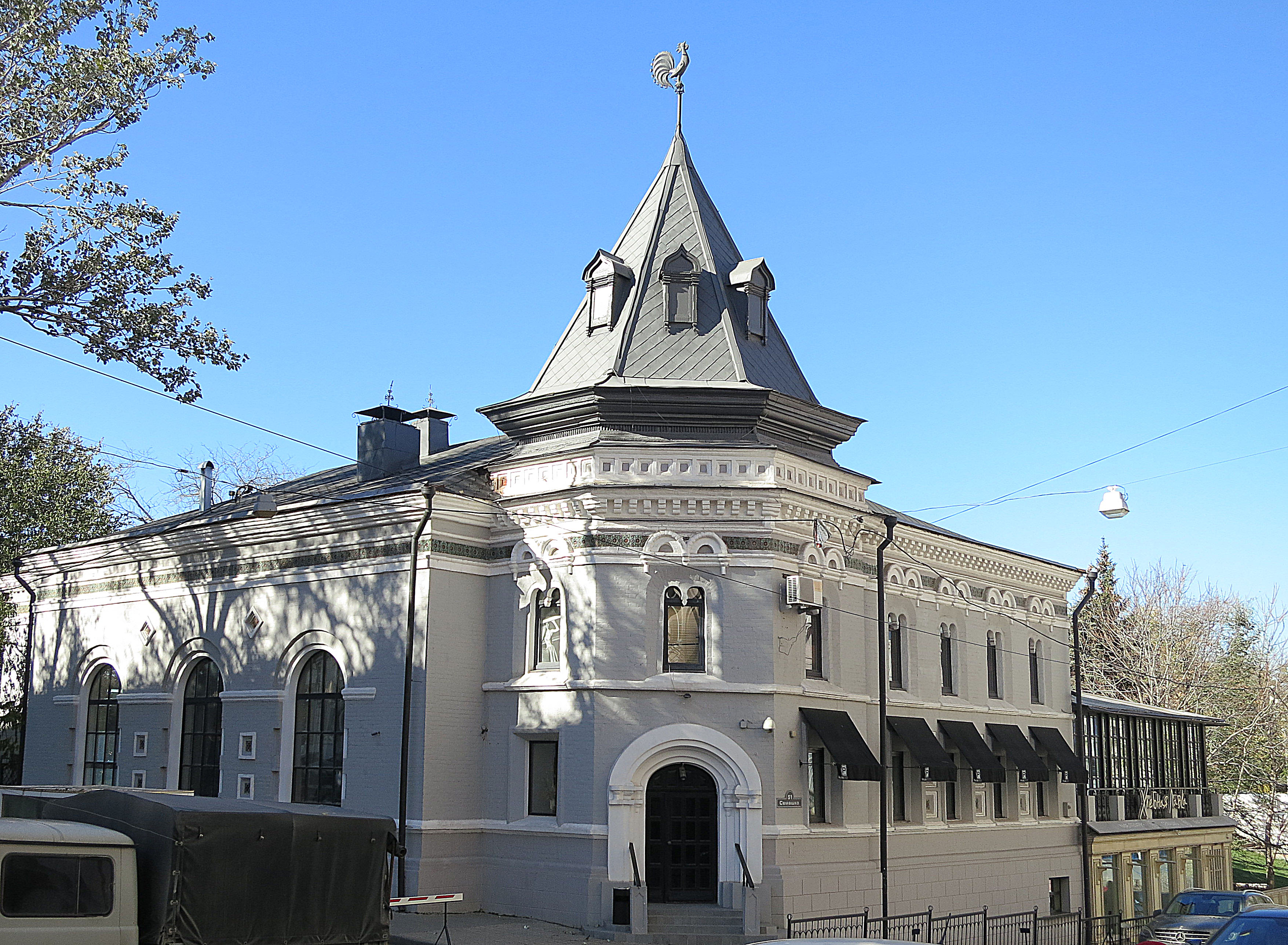 Здание школы домоводства и кулинарии (Ростовская область, Ростов-на-Дону, Думский проезд, 1 / переулок Семашко, 51)